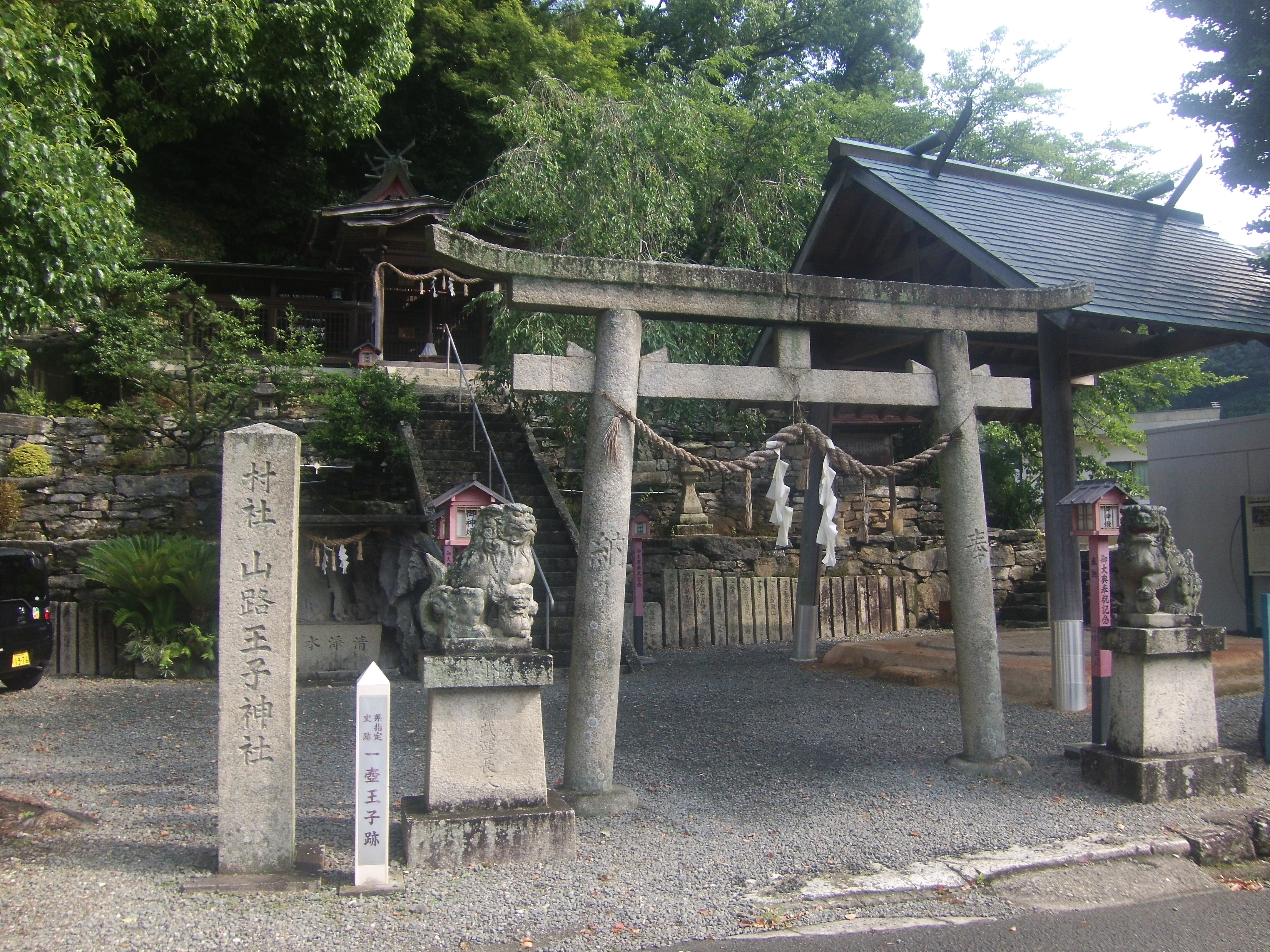 熊野古道・紀伊路の九十九王子の一つ一壺王子を祀る山路王子神社（和歌山県海南市）